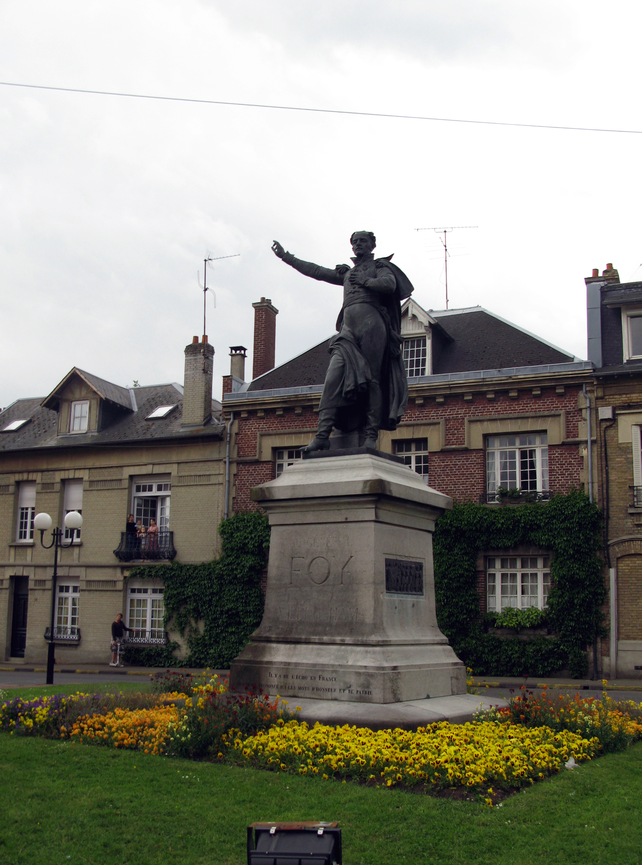 Ham (Somme, France) - Devant l'Hôtel-de-ville (sur le côté droit) se dresse la statue du Général FOY.